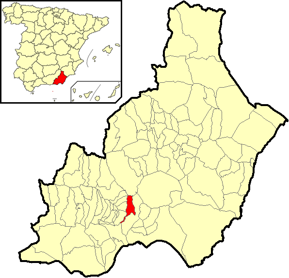 Situación del término municipal de Santa Fe de Mondújar respecto a la provincia de Almería, en España.